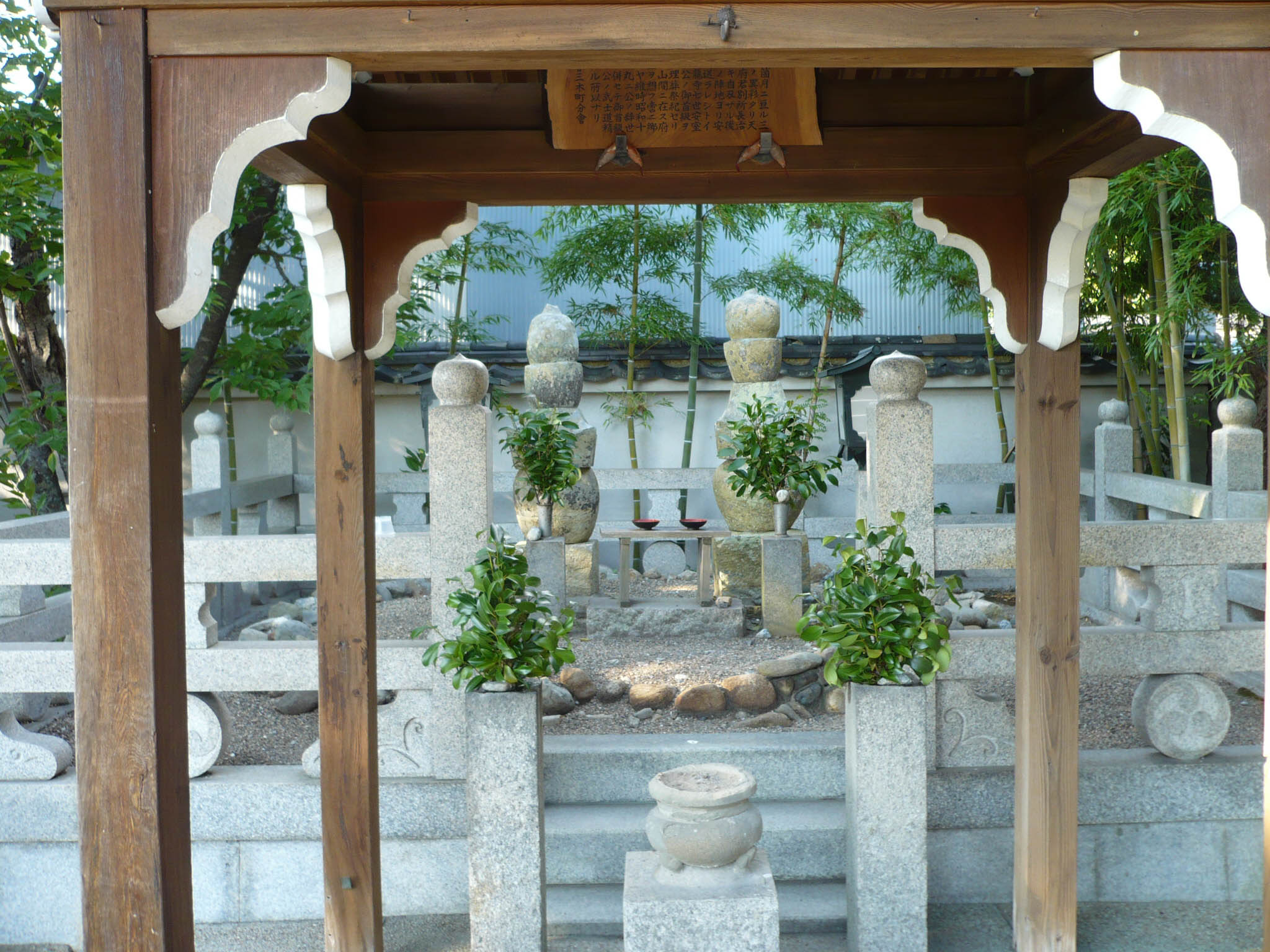 雲龍寺にある別所長治、照子夫人の首塚